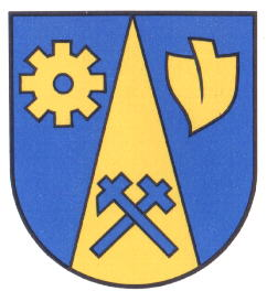 Wappen